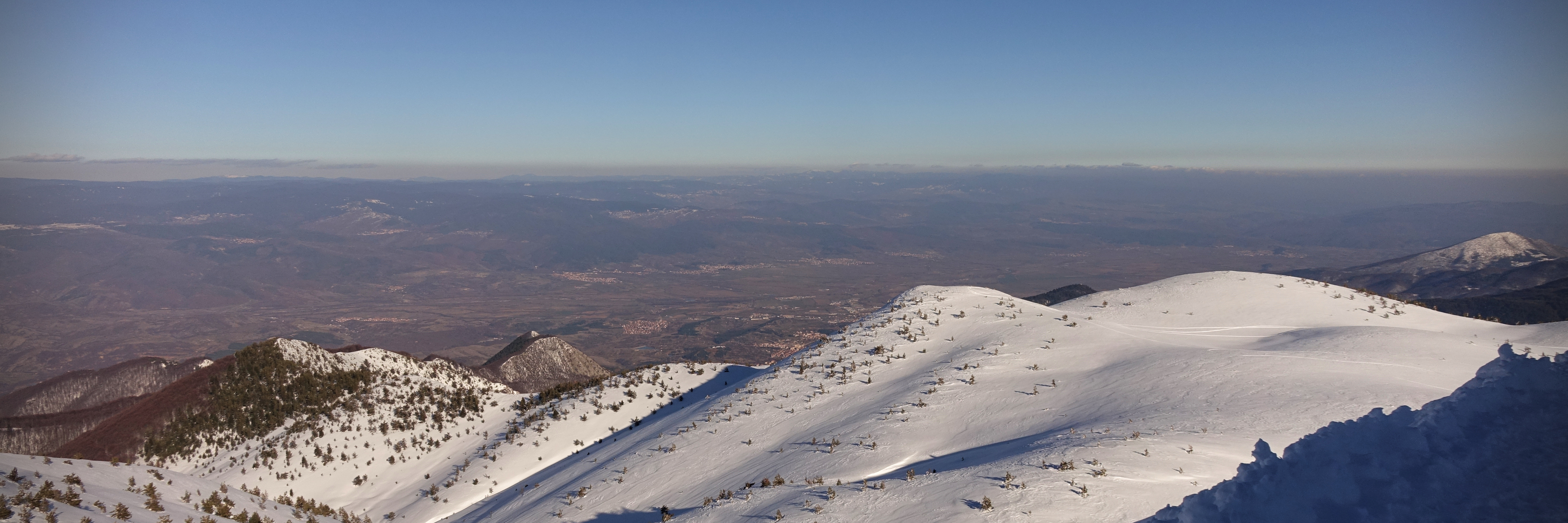 Долината на Места, гледана от връх Ореляк. В средата, в подножието на отсрещните хълмове на Родопите се виждат селата Огняново, Гърмен, Дебрен и Дъбница. По-близо се вижда село Борово, а вдясно - малка част от град Гоце Делчев.